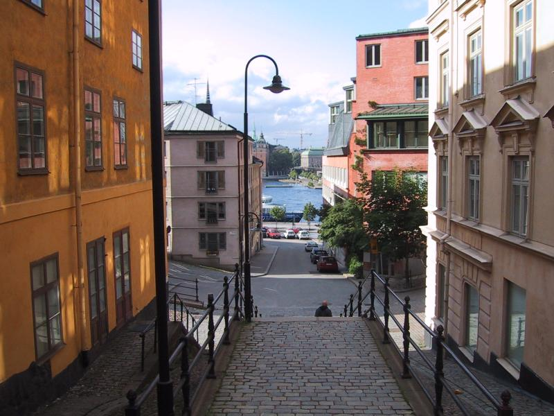 Ansicht in Södermalm